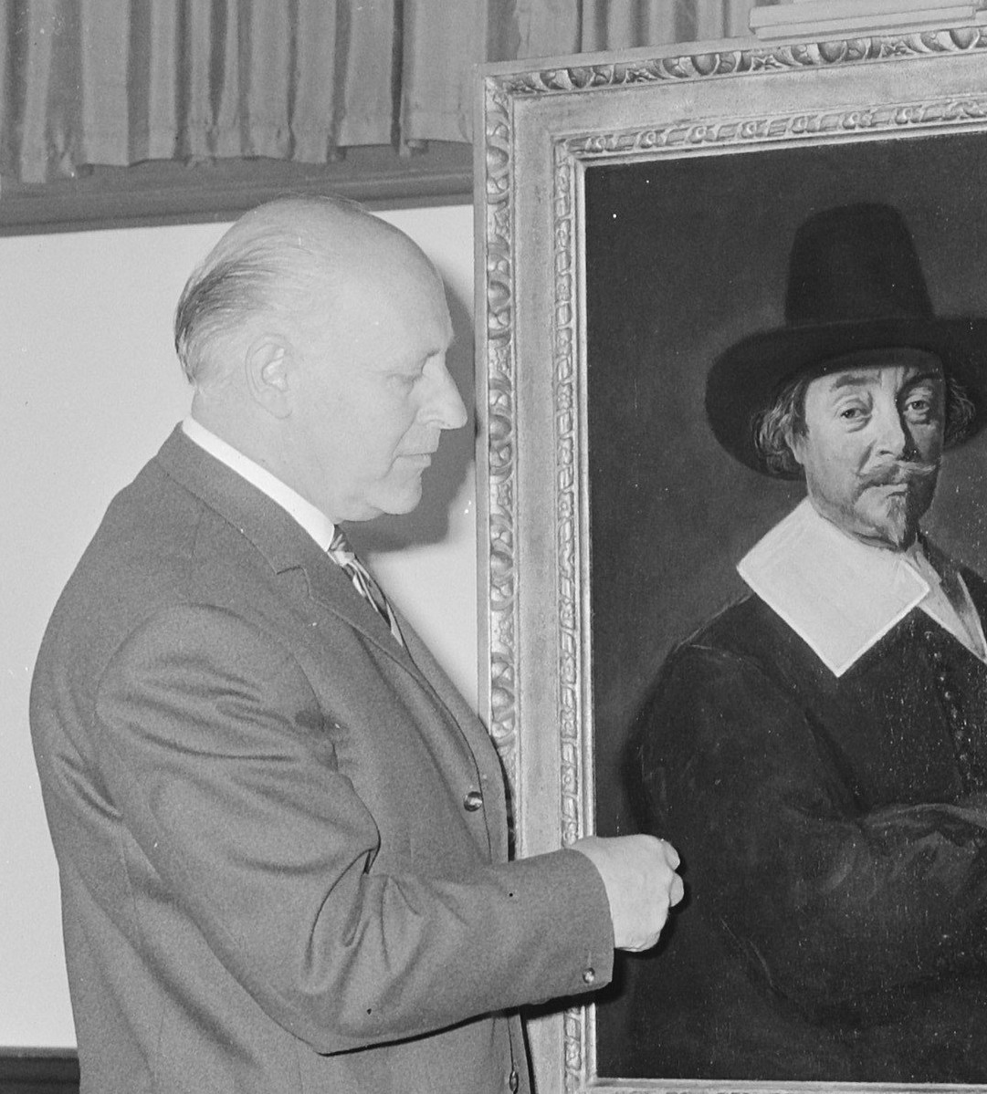 Collectie / Archief : Fotocollectie Anefo Reportage / Serie : [ onbekend ] Beschrijving : Een nieuwe oude meester van Frans Hals(...) heer Baard Datum : 20 mei 1964 Locatie : Muiderberg Trefwoorden : schilderijen Persoonsnaam : HALS FRANS Fotograaf : Pot, Harry / Anefo Auteursrechthebbende : Nationaal Archief Materiaalsoort : Negatief (zwart/wit) Nummer archiefinventaris : bekijk toegang 2.24.01.03 Bestanddeelnummer : 916-4519